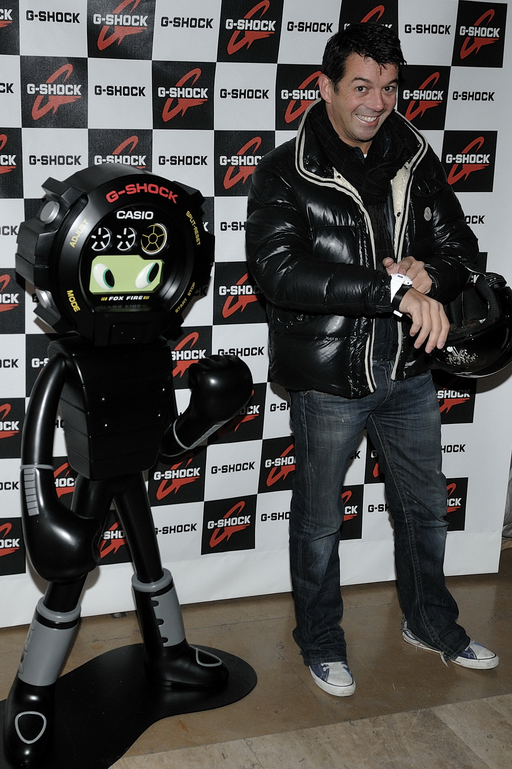 Stéphane Plaza à la Soirée SHOCK THE WORLD avec Casio qui fête les 25 ans de la célèbre G SHOCK. C'est au musée de l'homme, place du Trocadéro, que SHOCK IN PARIS a invité les meilleurs DJ du moment et quelques VIP.